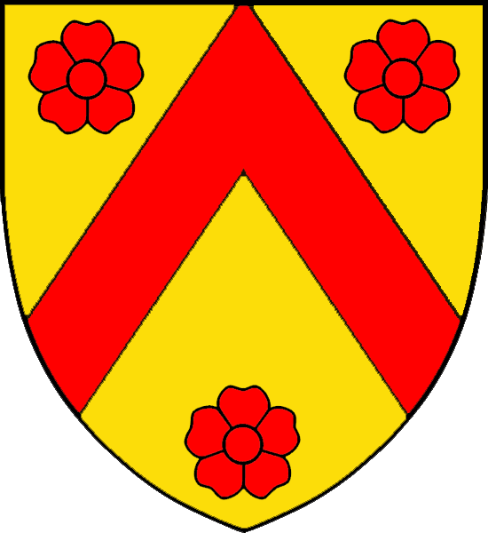 Vapensköld för Nils Abjörnsson (Sparre av Tofta)